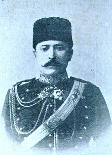 Ali Rıza Paşa (1854-1921)